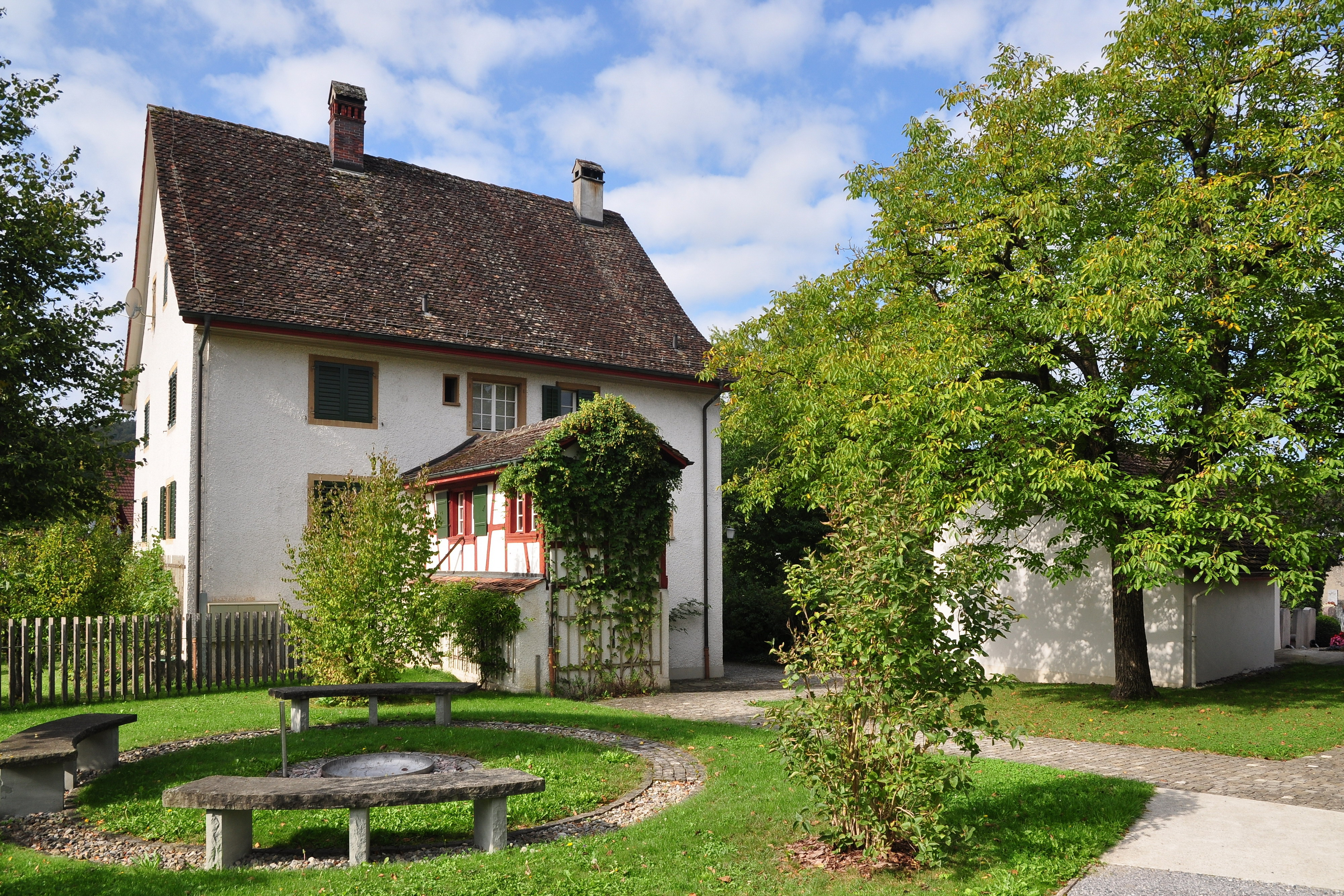 Kirchenbezirk, Büelstrasse 17 in Weiach (Switzerland)